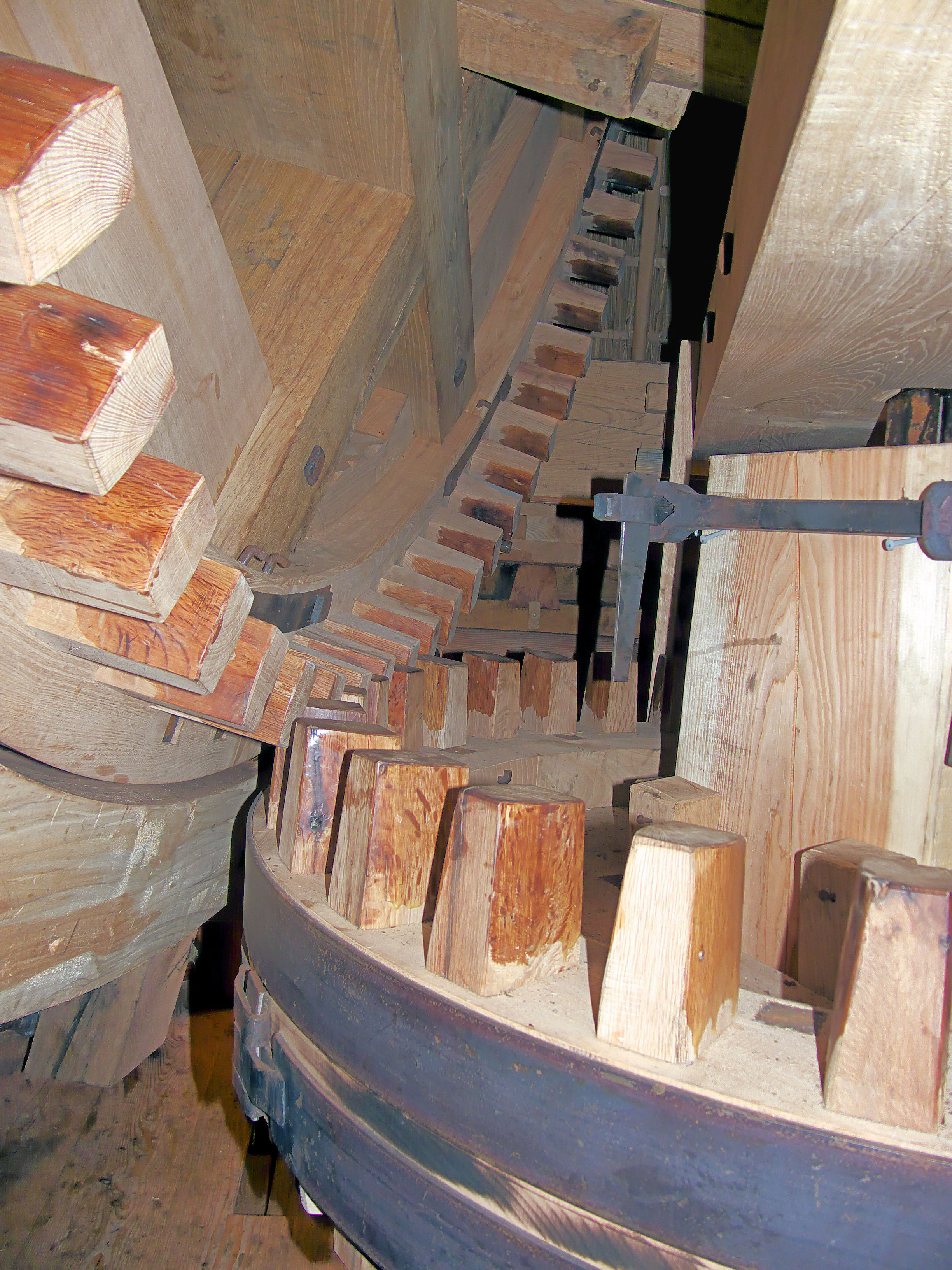 Molen De Koe Ermelo, bovenwiel met bonkelaar. Let op het in elkaar grijpen van de kammen.